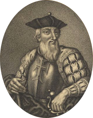 Vasco da Gama, navegador e explorador português.